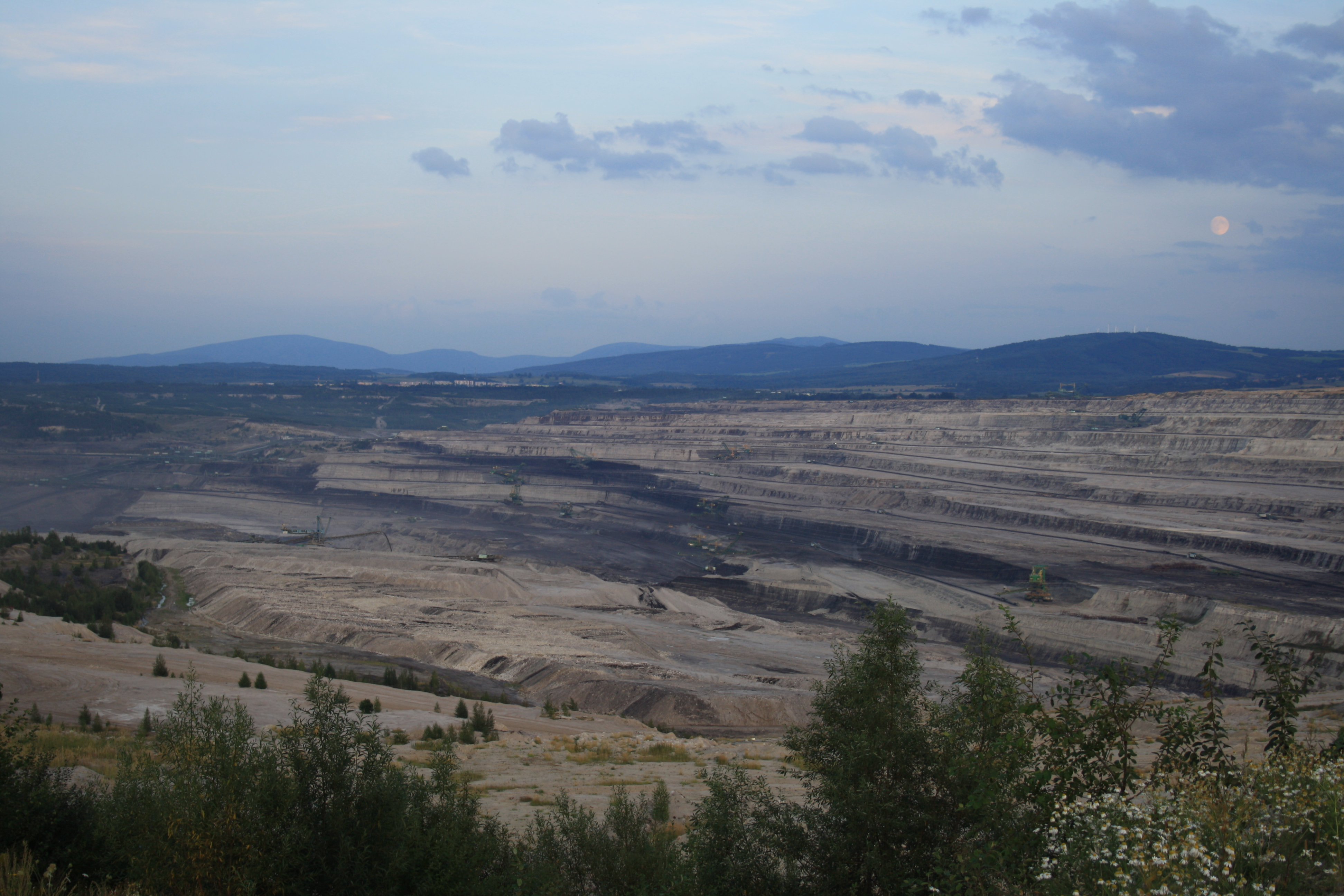 Sieniawka Tagebaugrube